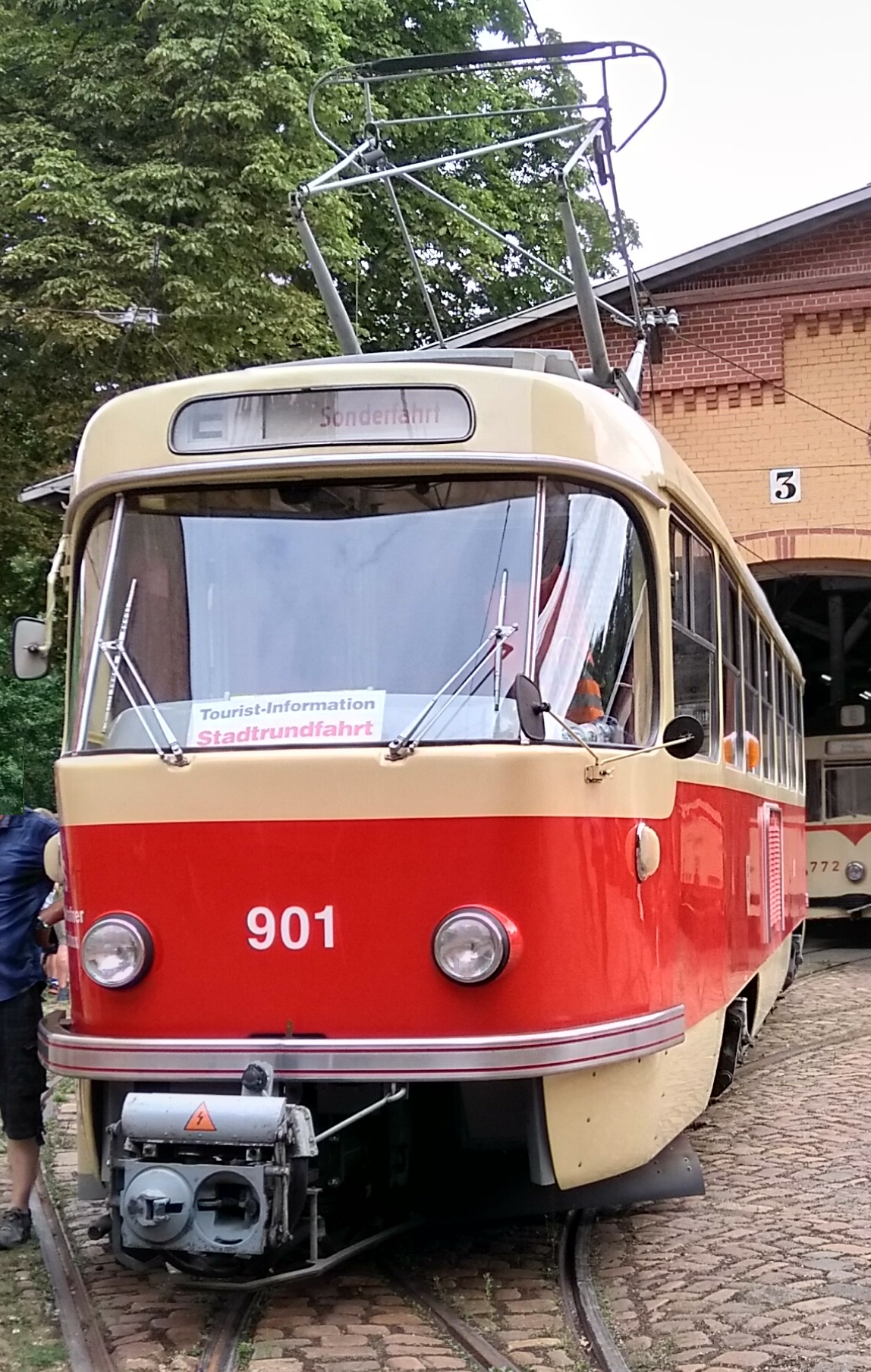 Vůz T4D vystavený před vozovnou Tramvajového muzea v Halle (Saale).